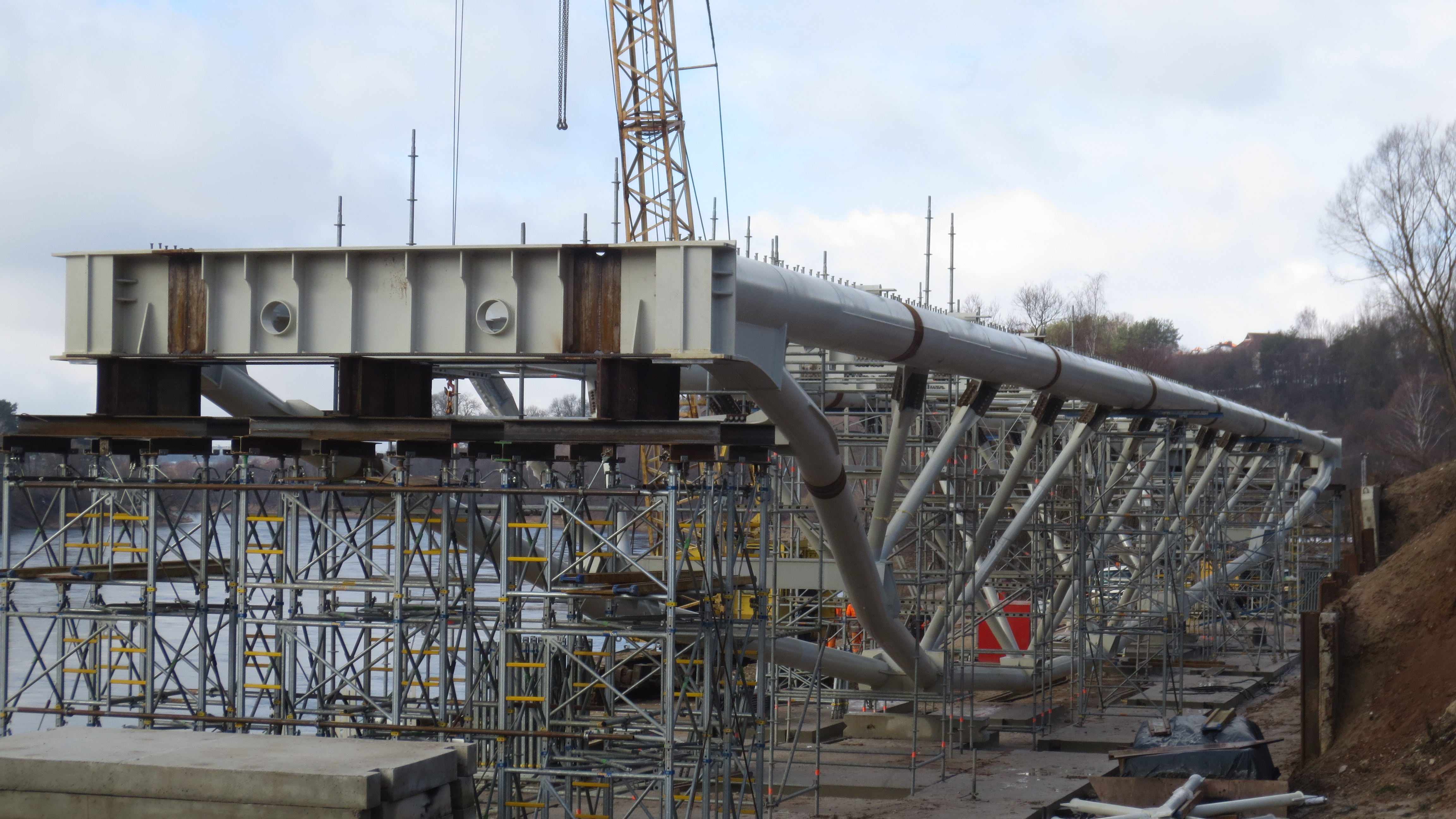 Suvirinta kraštinio tarpatramio perdangos paspyrinė konstrukcija